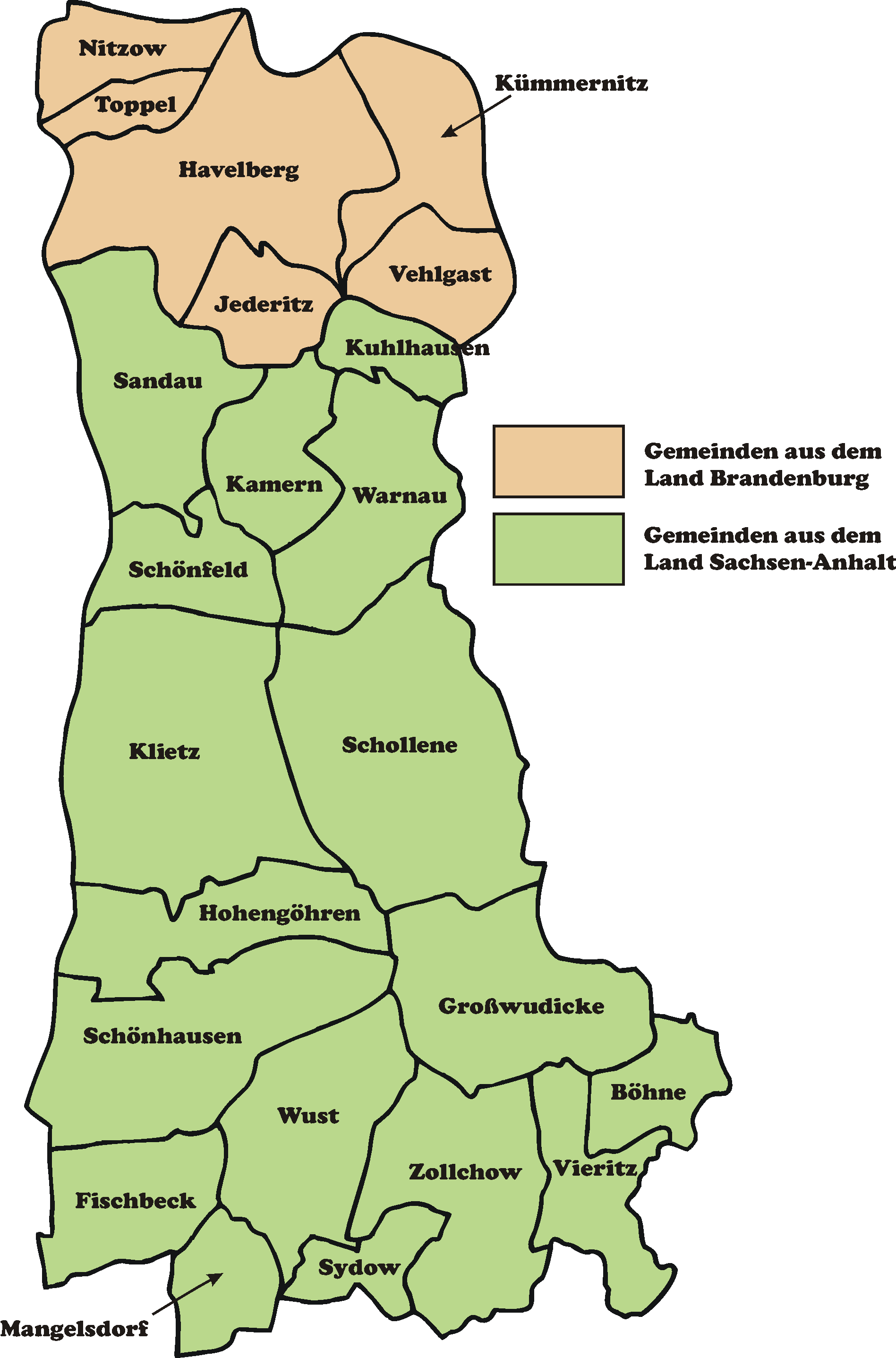 erstellt durch T.Rystau (Ollemarkeagle)